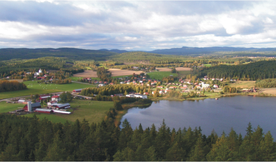 Vy över Rengsjö från Bullerberget, Hälsingland, Sweden.